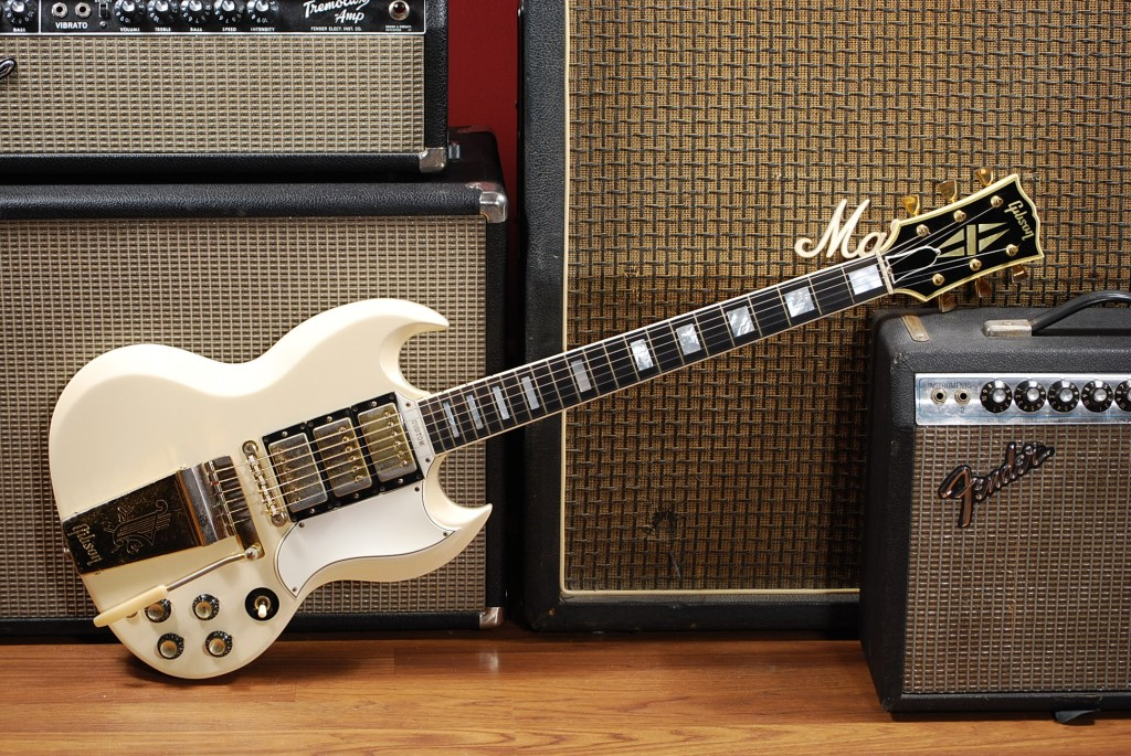 Gibson Sg